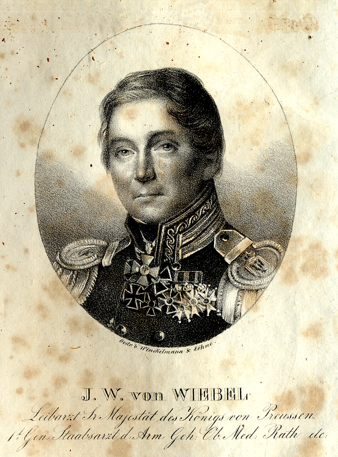 Porträt des ARtzes Johann Wilhelm von Wiebel auf den Seiten der Uni Trier